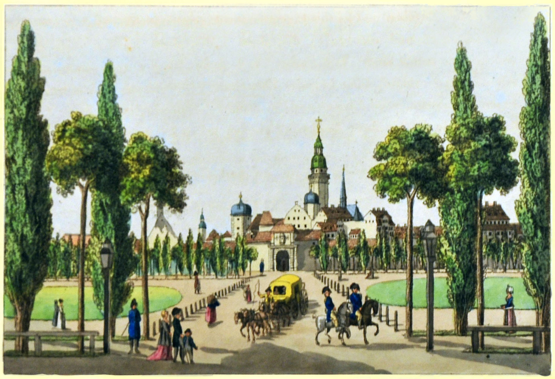 Leipzig 1804 Das Grimmaische Tor Aquarellierter Kupferstich 15,5 x 21 cm (Plattenrand) aus: Schwarz, Karl Benjamin: Romantische Gemählde von Leipzig. Eine Folge von vier und zwanzig Prospecten gezeichnet und gestochen von Karl Benjamin Schwarz. Leipzig: Karl Tauchnitz 1804, 56 S. + 23 aquarellierte Kupfertafeln + 1 nicht kolorierter Stich. Carl Benjamin Schwarz: Vedutenstecher, Zeichner, Radierer, Farbstecher und Aquarellist (*1757 Leipzig, † 21.10.1813 ebenda). Schüler Oesers; Kustos an der Winklerschen Kunstsammlung (THIEME-BECKER Bd. 30, S. 365).